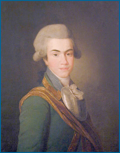 Долгоруков